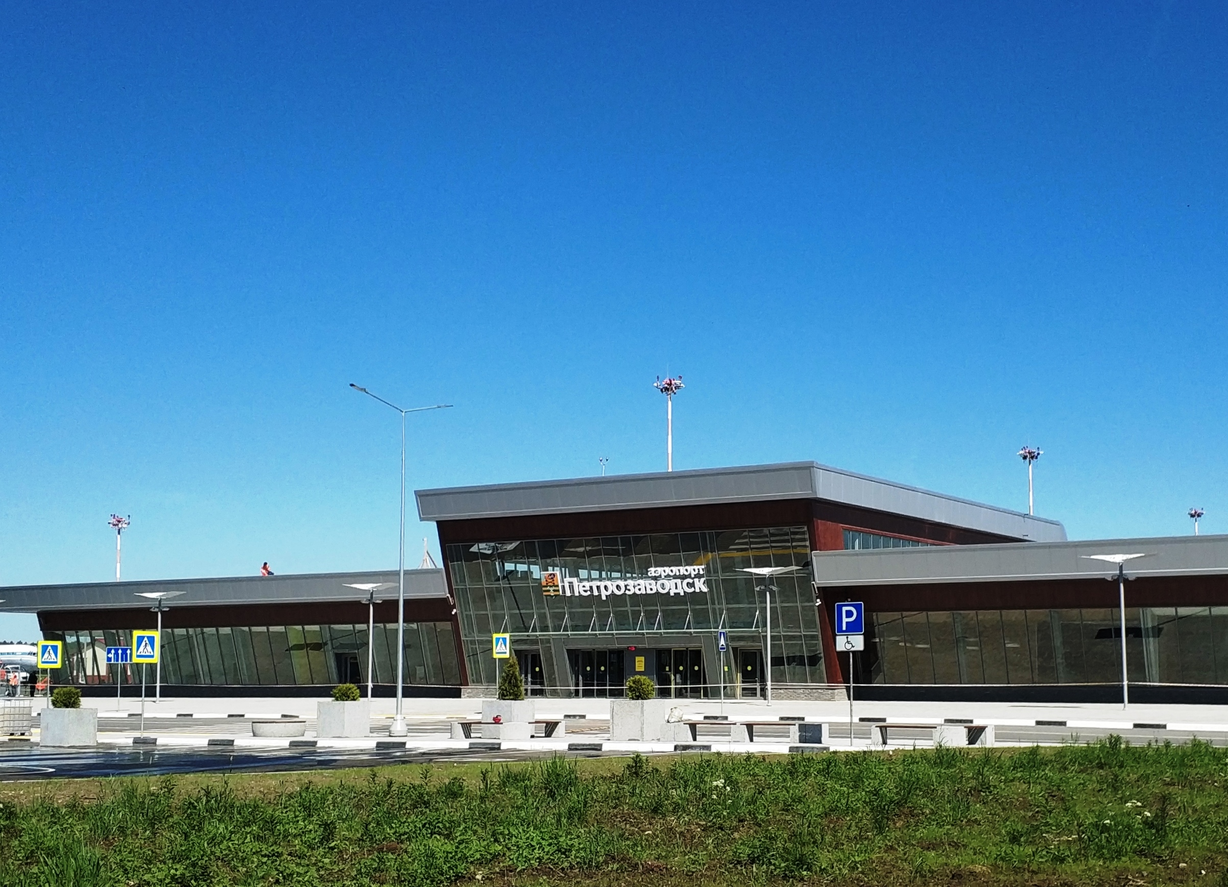 Здание аэропорта "Петрозаводск" (Бесовец, Карелия). Год постройки 2020 г.